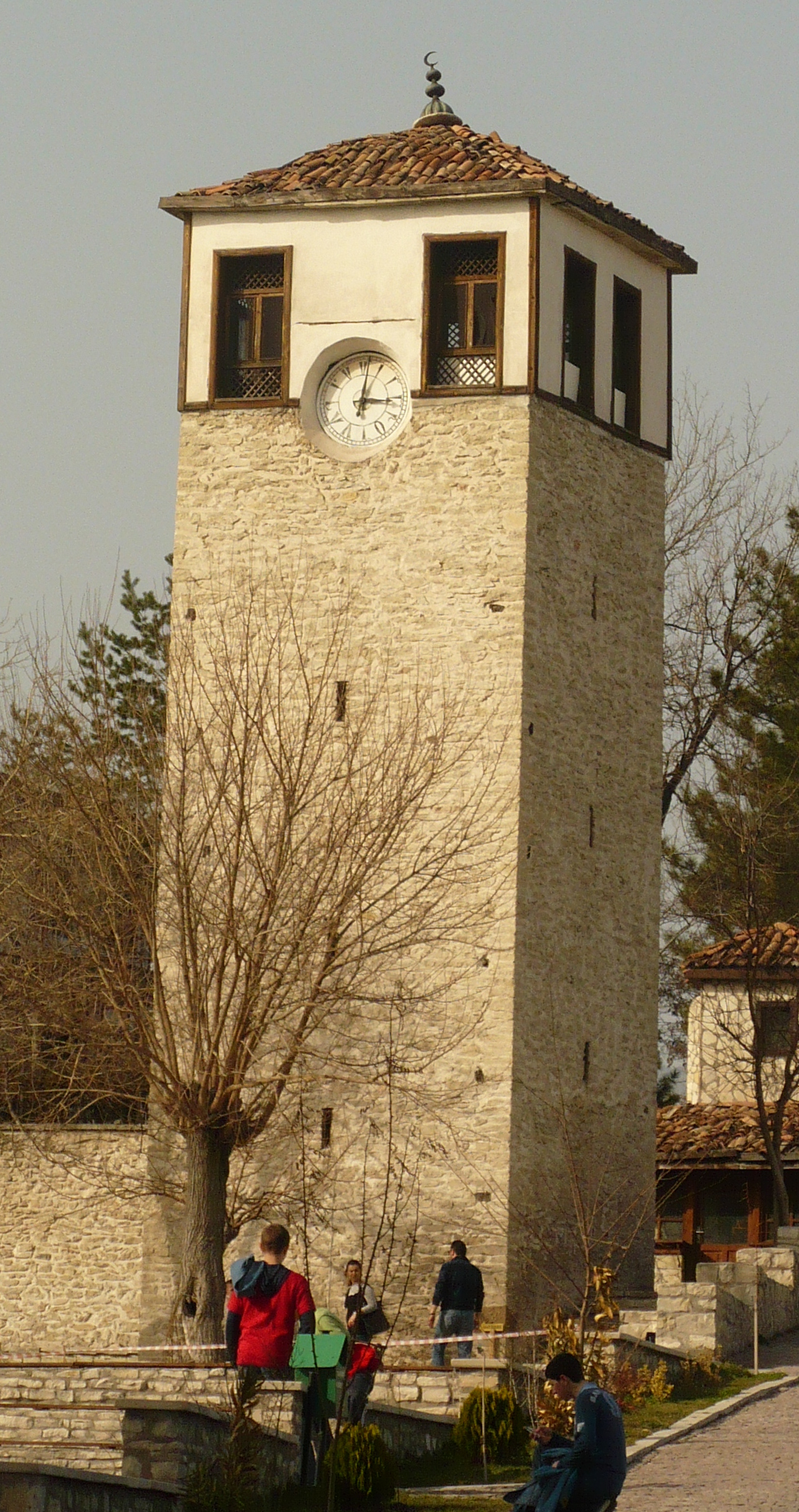 Safranbolu'dan bir görüntü